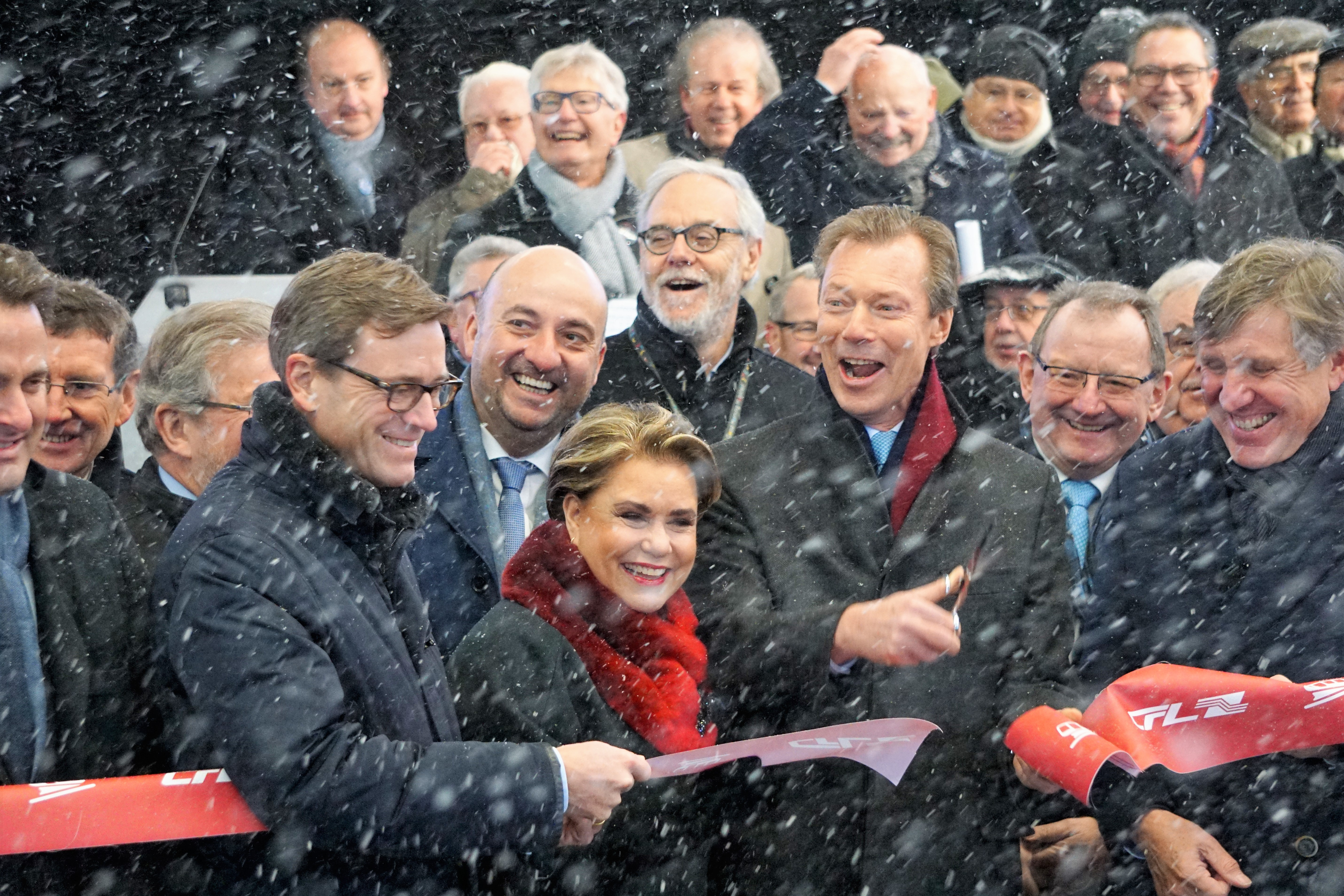 Inauguration du funiculaire et de la ligne de tramway à Luxembourg le 10 décembre 2017. Cérémonie de coupure du ruban par le Grand-Duc Henri.